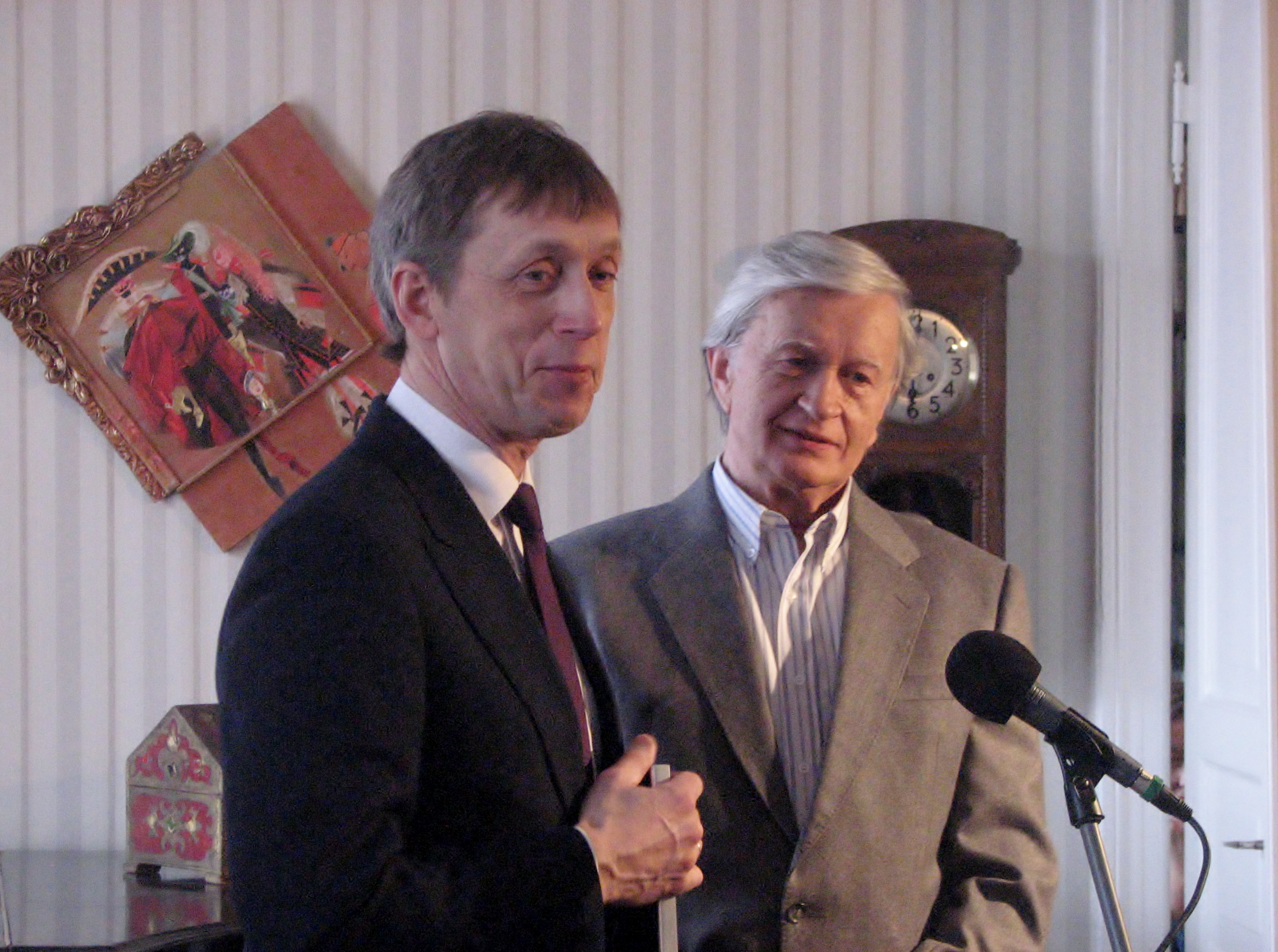 Margus Allikmaa Särevi Teatritoas Hans Kaldojale Raadioteatri näitlejaauhinda üle andmas